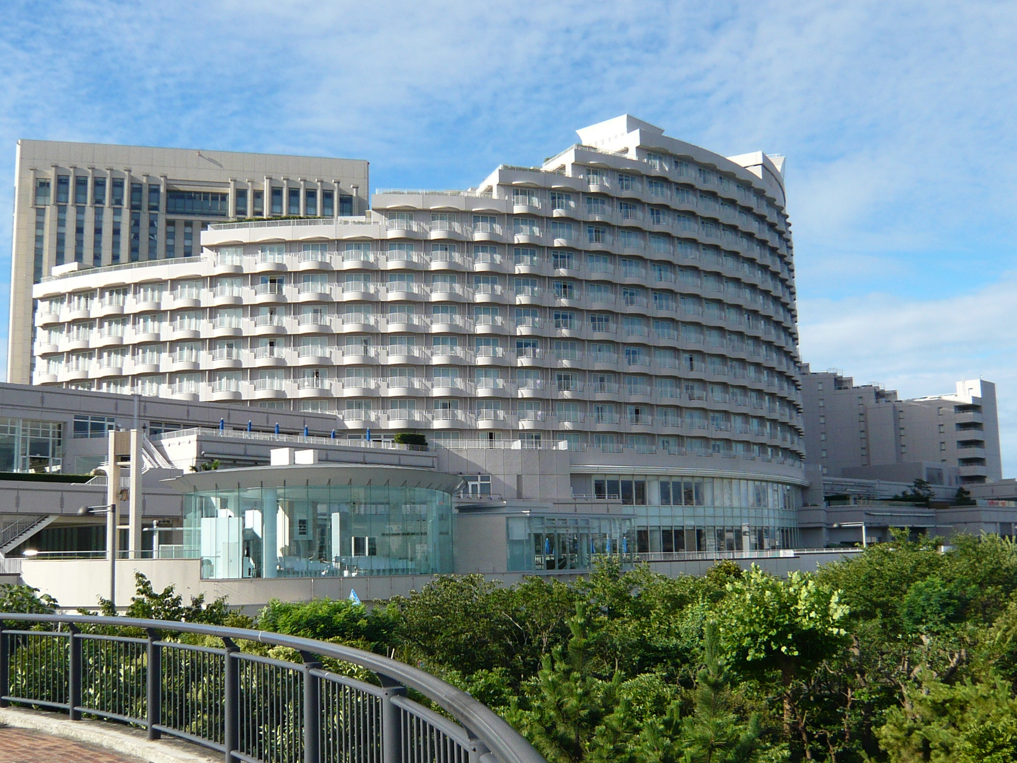 Hotel Nikko Tokyo in odaiba, Tokyo, Japan.